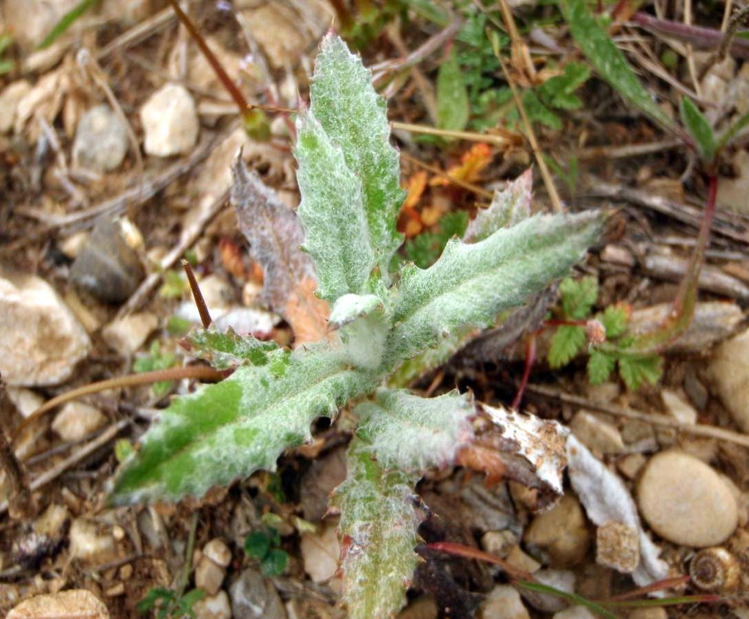 Atractylis cancellata - Plántula; detalle del denso indumento foliar araneoso. - Martigues (Departamento de Bouches-du-Rhône, Francia).